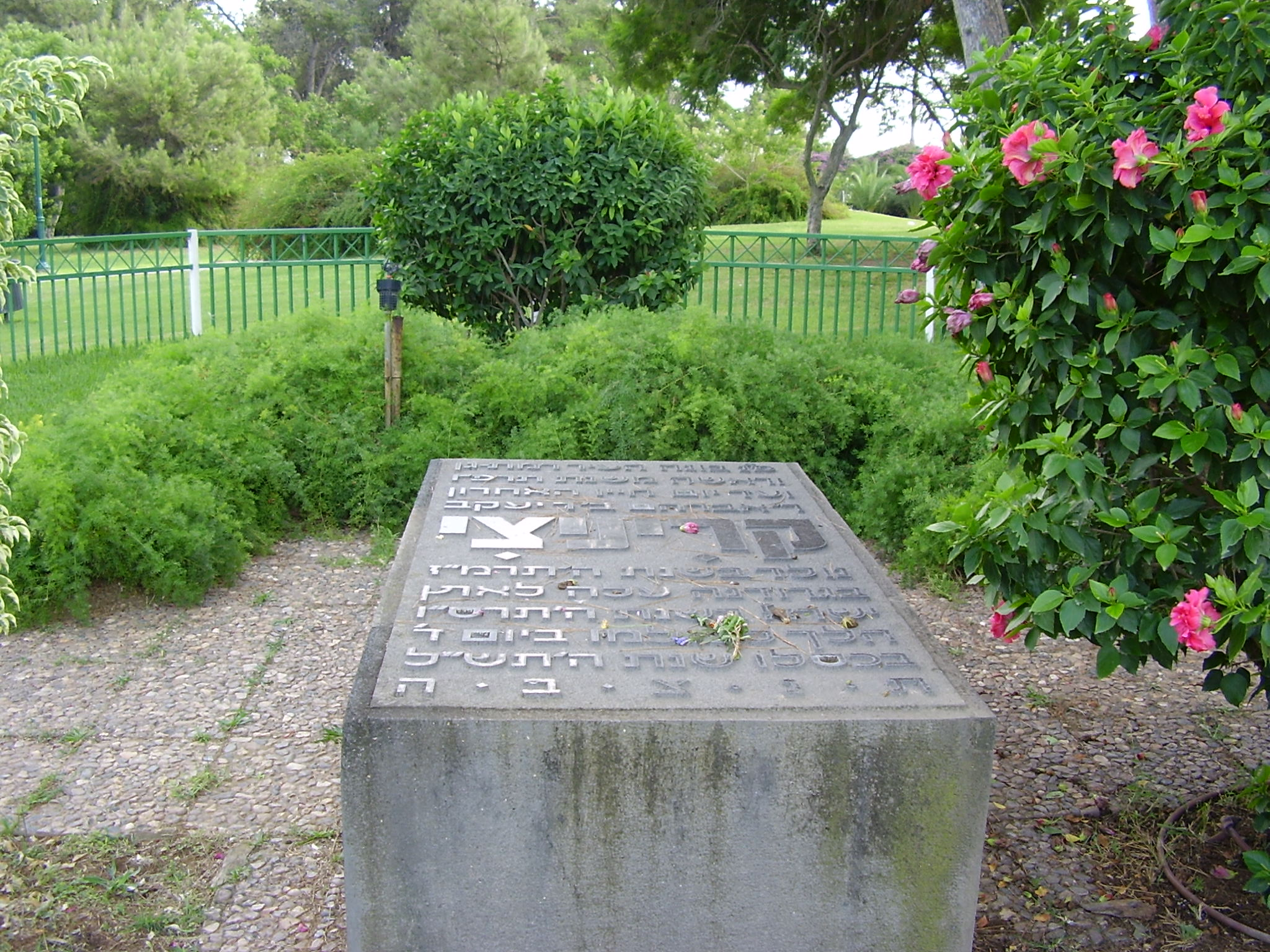 avraham krinizi tomb, national park, ramat gan, israel